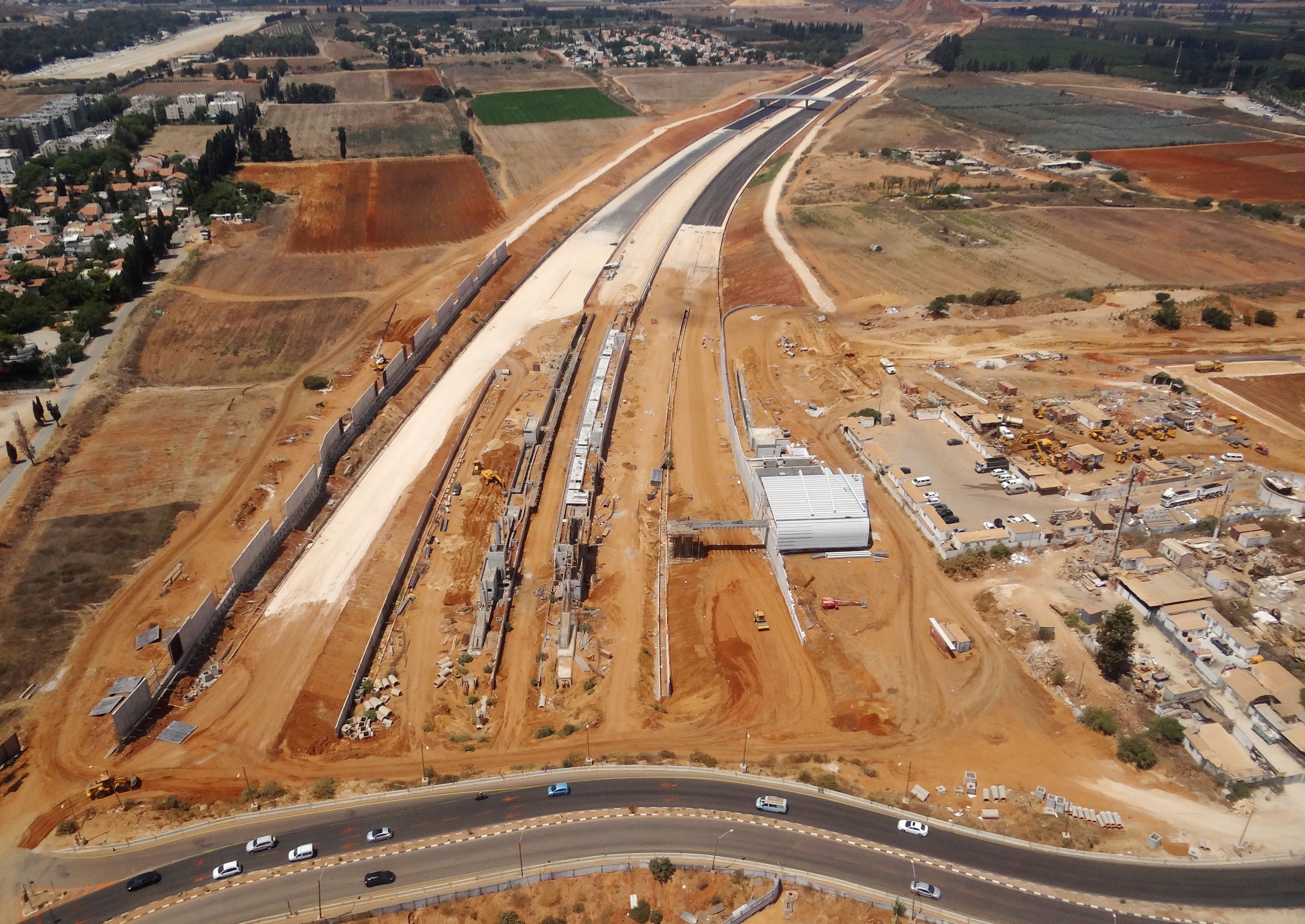 סלילת המשך כביש 531 ומסילת השרון מצפון לשדה תעופה הרצליה